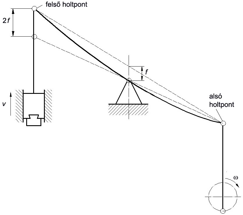 Ajax-kalapács laprugó-kötegének behajlása